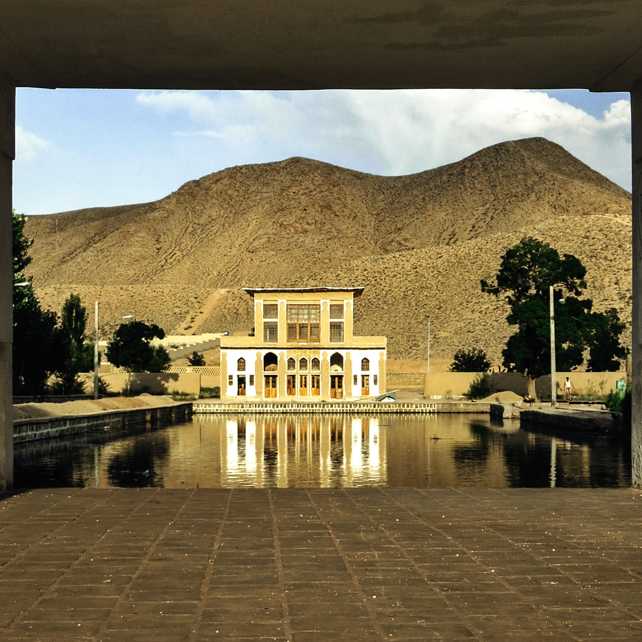 عمارت تاریخی چشمه علی دامغان